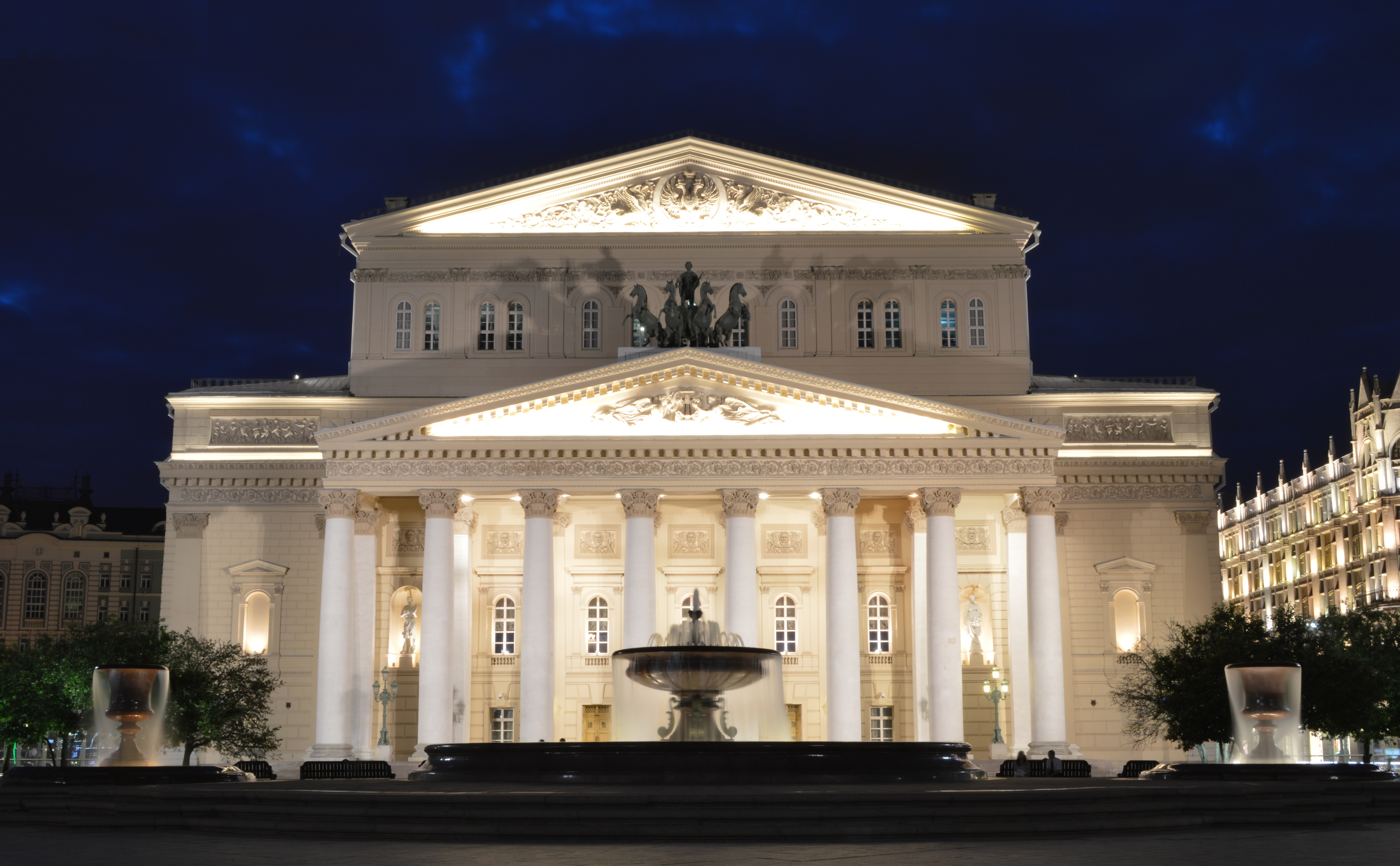 Большой театр